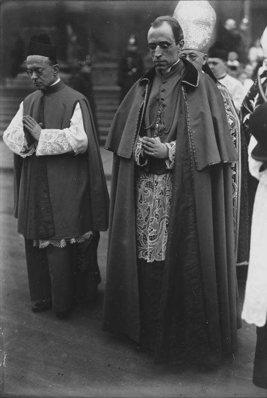 Der päpstliche Nuntius Pacelli wird Kardinal! Der päpstliche Nuntius Pacelli in Berlin (Mitte) wird aus seinem diplomatischem Amte endgültig ausscheiden. Er wird im nächsten Konsistorium zum Kardinal kreiert werden.